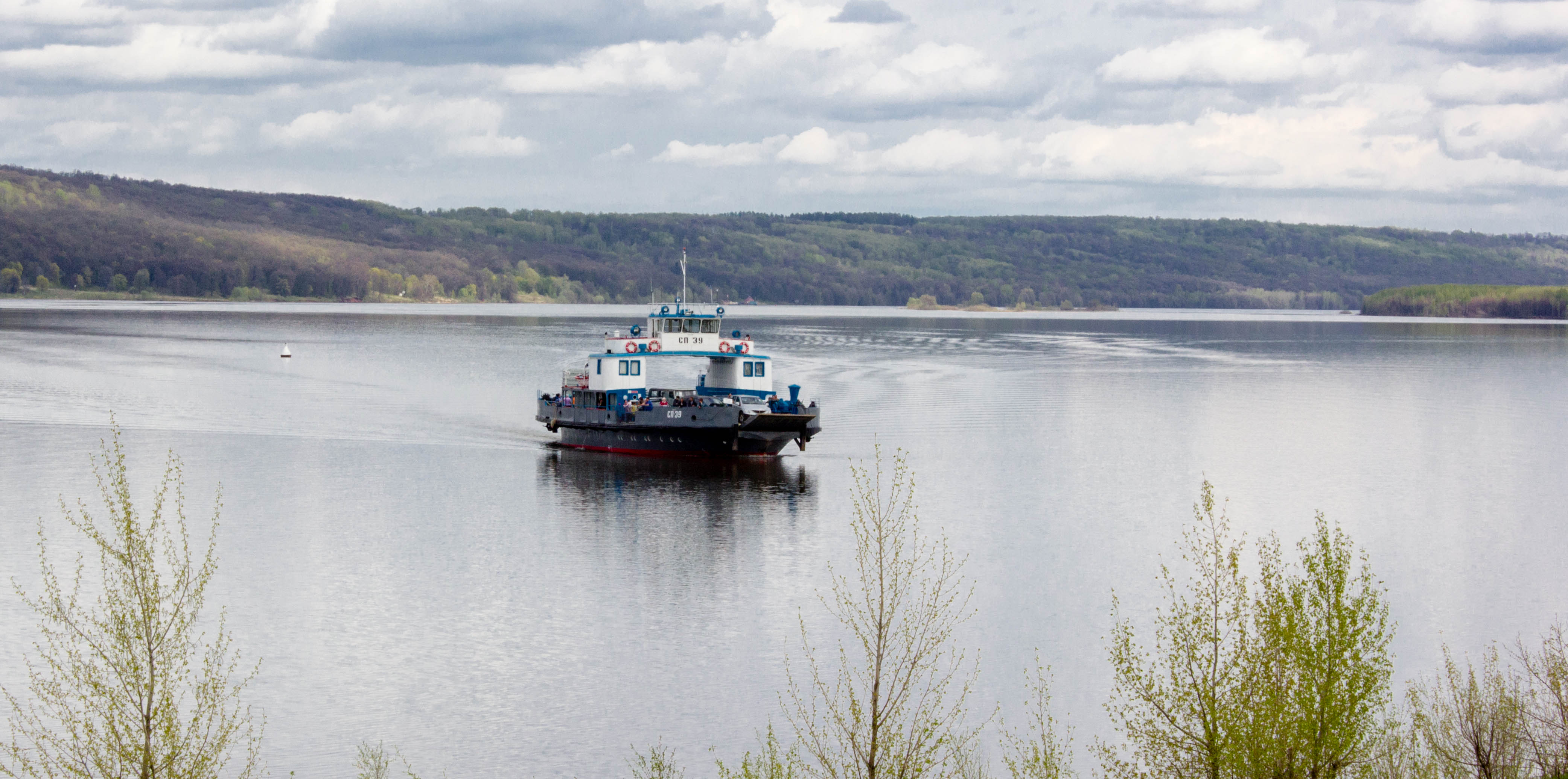 Паром Васильсурск — Лысая Гора